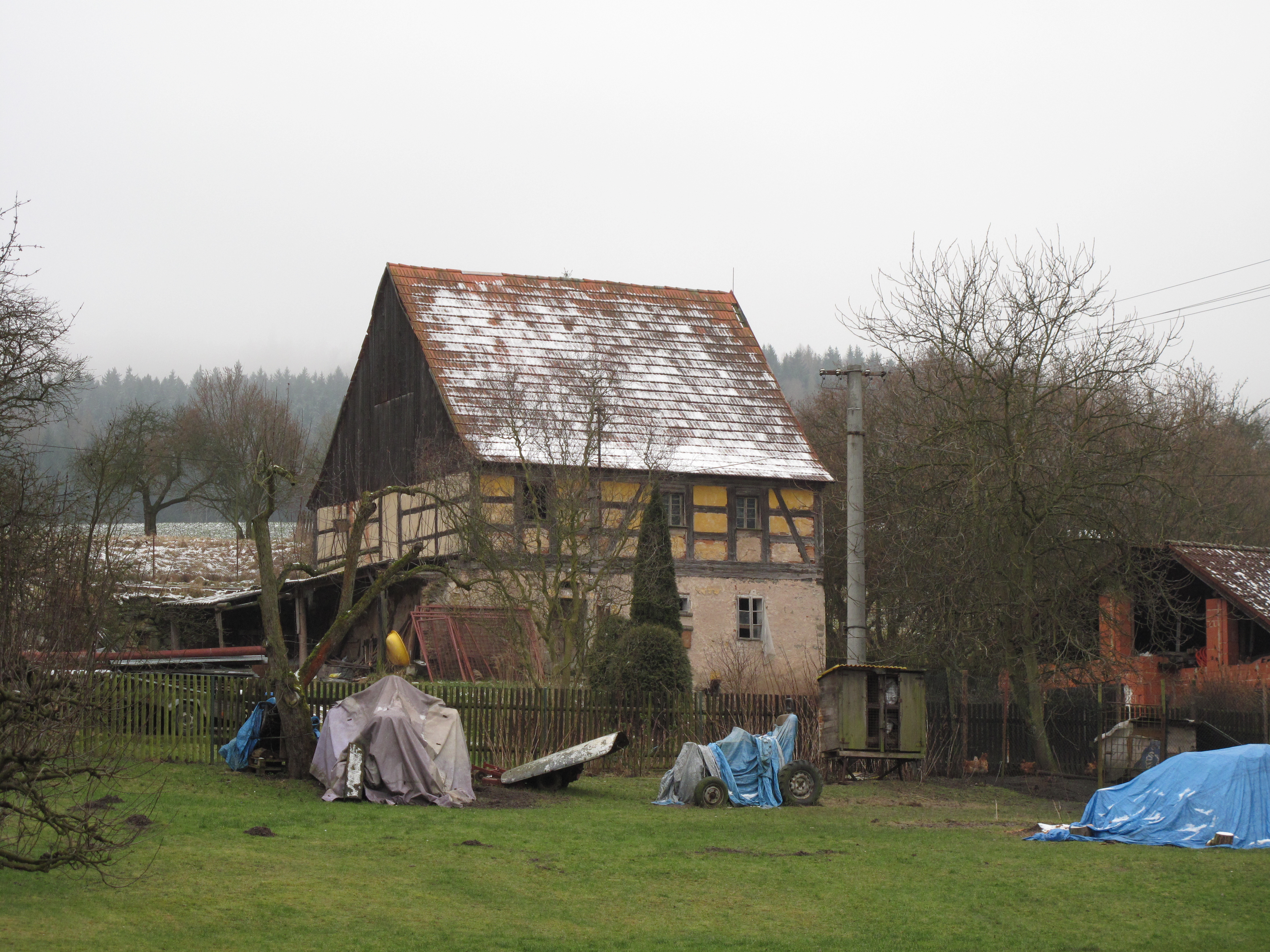 Hrázděný dům v Sedlečku. Okres Karlovy Vary, Česká republika. Object location50° 14′ 08.48″ N, 12° 57′ 31.11″ E